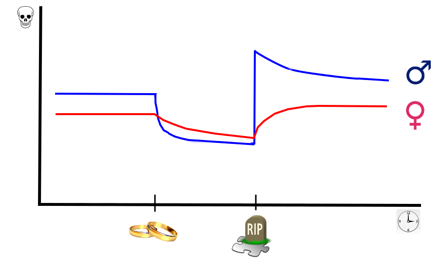 Zależność między ryzykiem przedwczesnej śmierci, a małżeństwem i śmiercią jednego z małżonków.